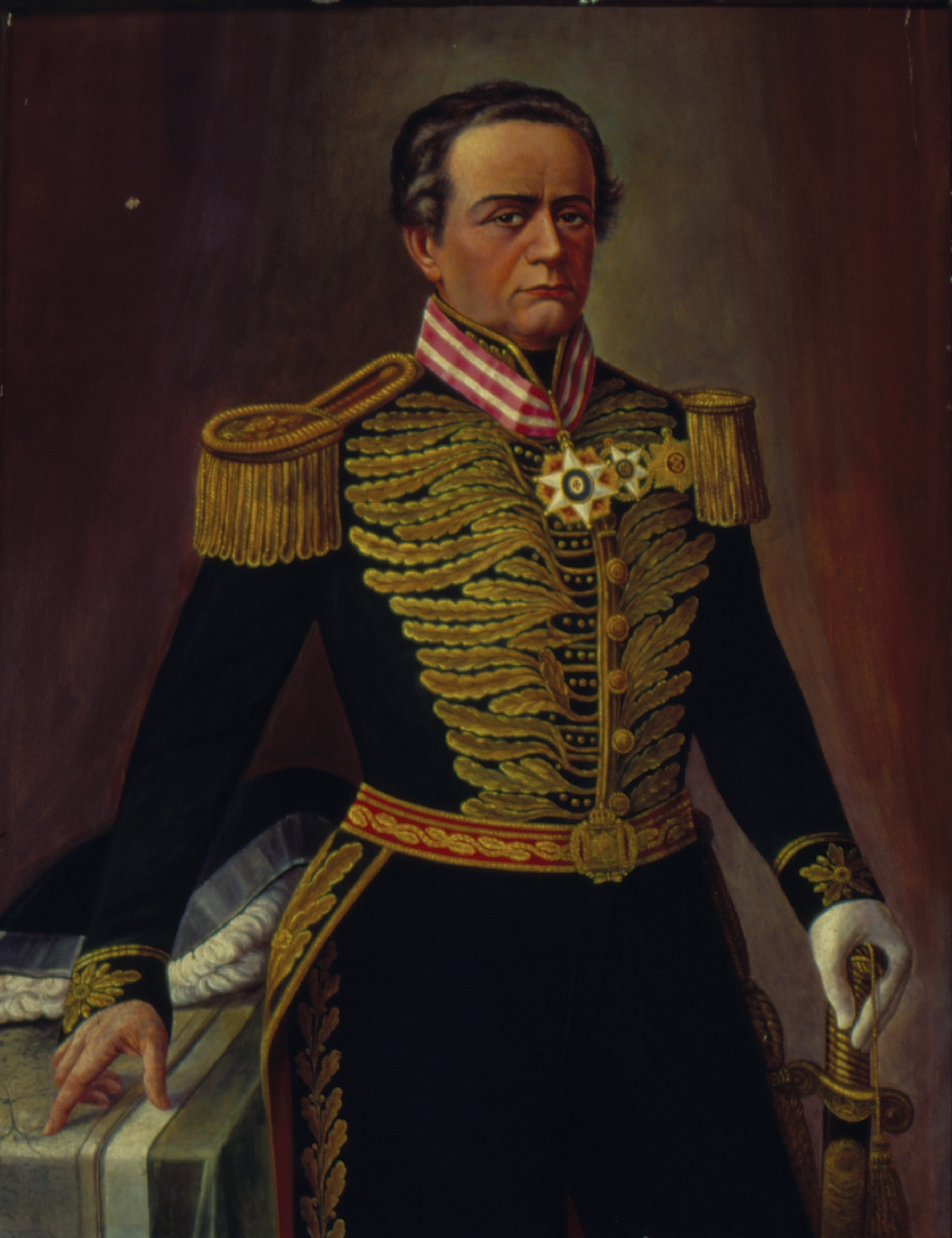 Obra que integra o acervo do Museu Paulista da USP.